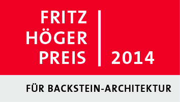 Logo Fritz-Höger-Preis 2014 für Backstein-Architektur